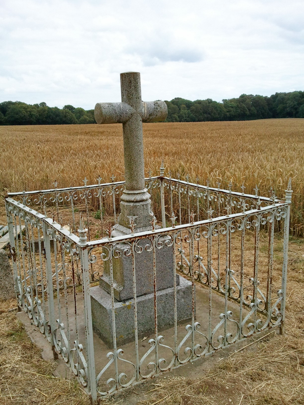 THOIX - Monument commémoratif aux aviateurs du Potez 63-11 n° 493 du GAO 510, abattu lors des combats de la Bataille de France le 5 juin 1940 : * NOIRET Lucien, Lieutenant-observateur, né le 4/04/1915 à Tulle ; * RAGE Henry, Adjudant-mitrailleur, né le 18 janvier 1907 à Lyon